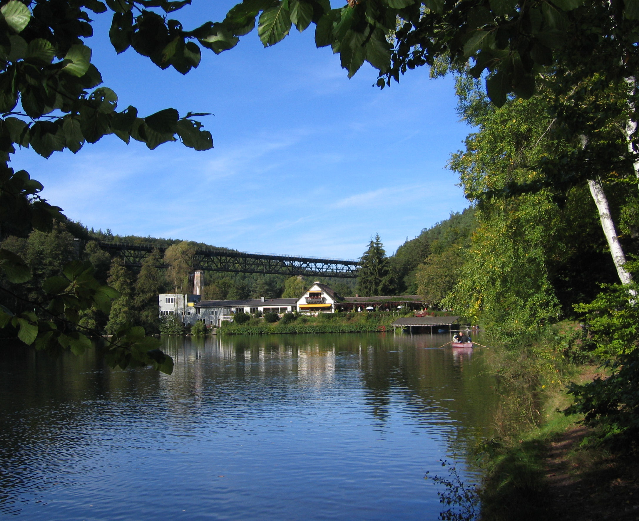 lake in Donnersbergkreis, Germany